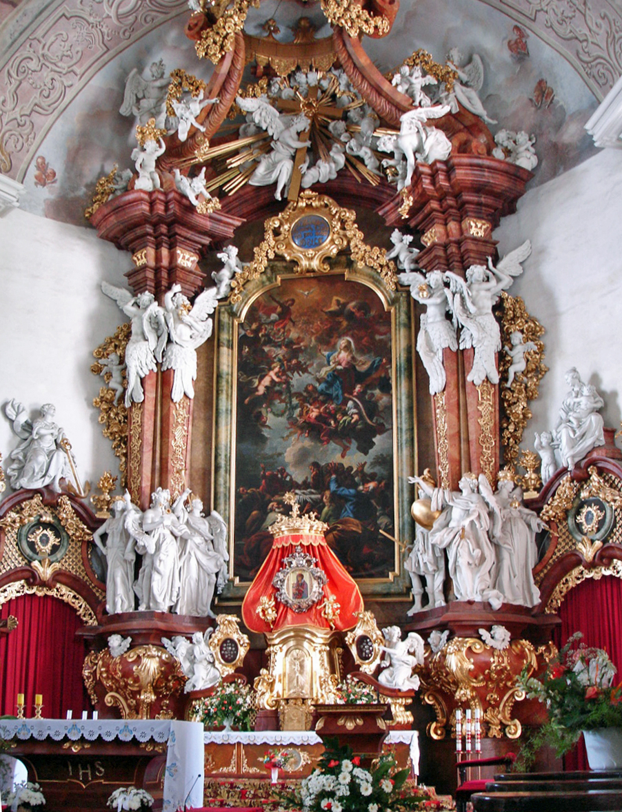 Krzeschów (Grüssau), Hauptaltar der Klosterkirche Mariä-Himmelfahrt